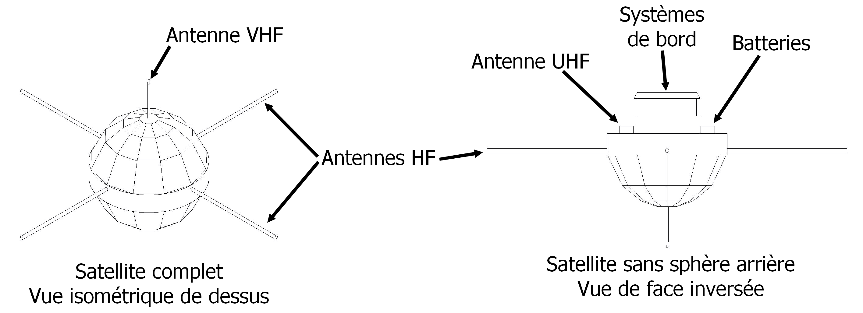 Schéma du satellite chinois Dong Fang Hong 1, et des divers instruments qui composent la mission.